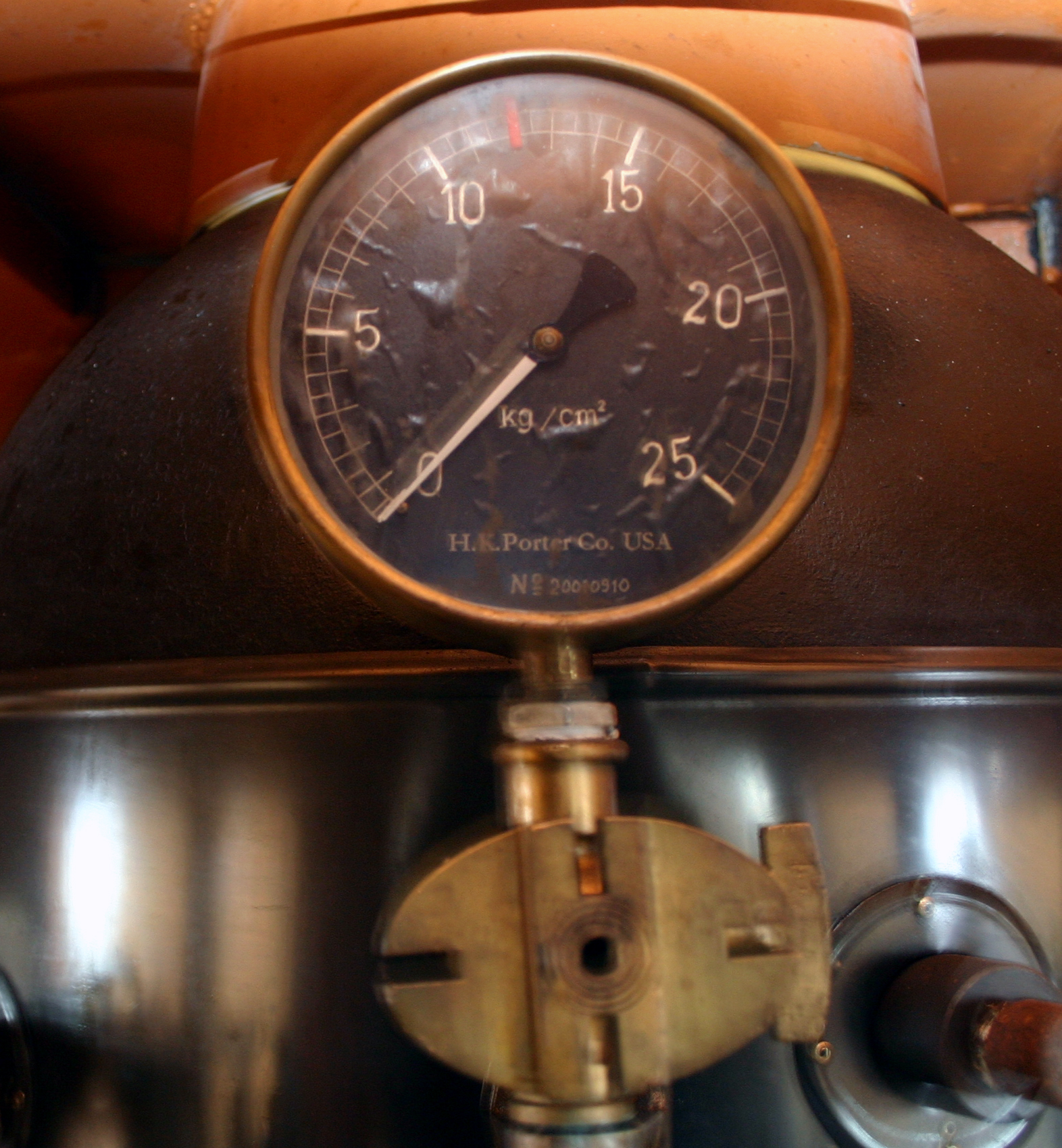 Höyryveturin painemittari